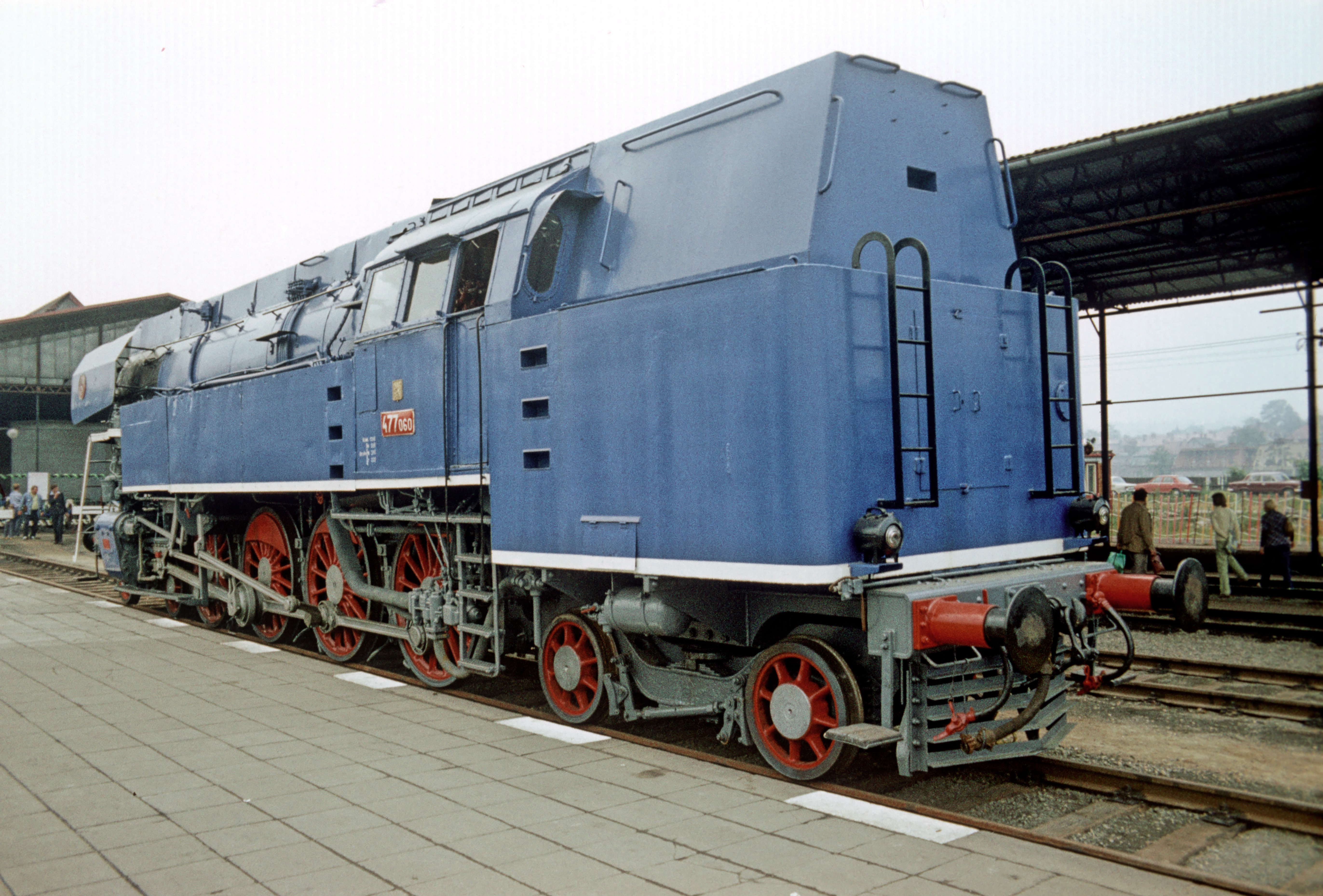 Spurtstarke Drillingsmaschine für den schnellen Vorortverkehr, erstaunlicherweise mit nur halbhohen Türen. ČKD hat sich nach dem Krieg nicht von den »neuen Baugrundsätzen« anstecken lassen und blieb bei Barrenrahmen. Dafür sind die letzten Maschinen der Reihe 477 mit Rollenlagern in Achs- und Stangenlagern ausgerüstet worden, gut an den runden Stangenlagergehäusen ohne Schmiergefäße zu erkennen.